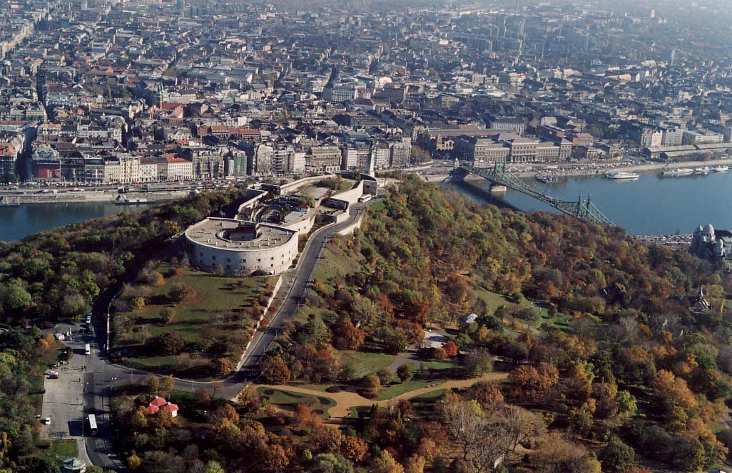 Citadella - Budapest - Hungary - Europe